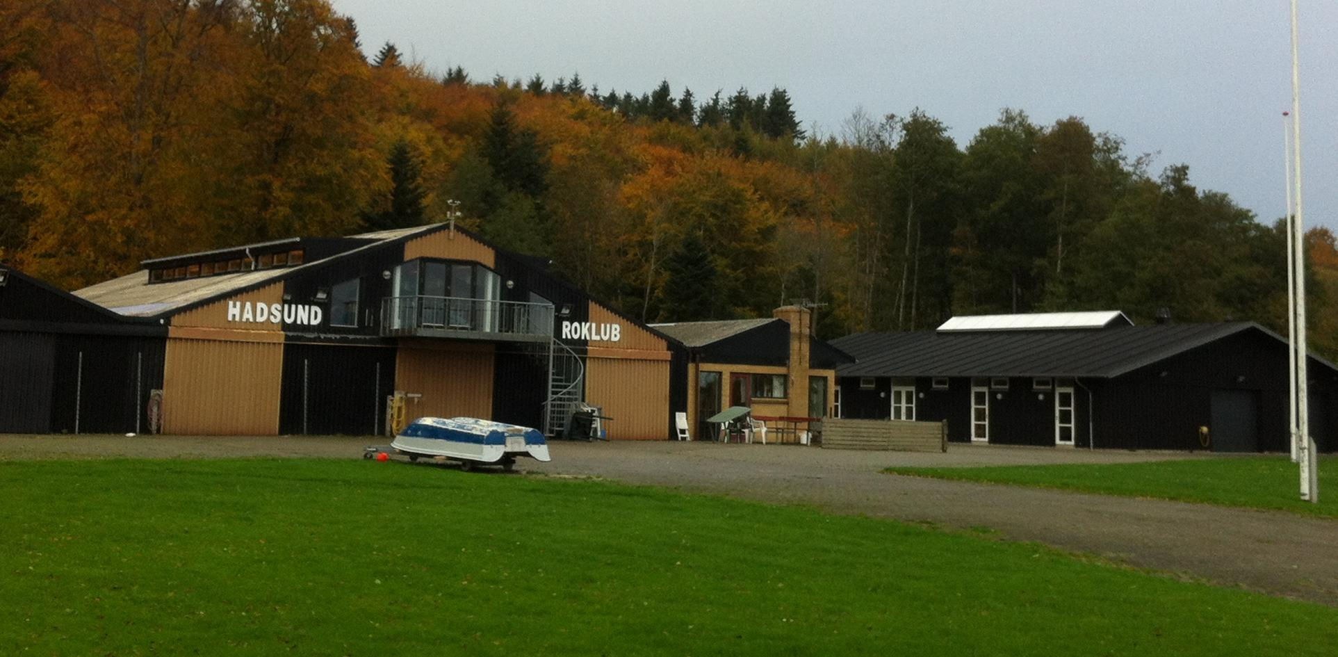 Hadsund Roklubs klubhus.